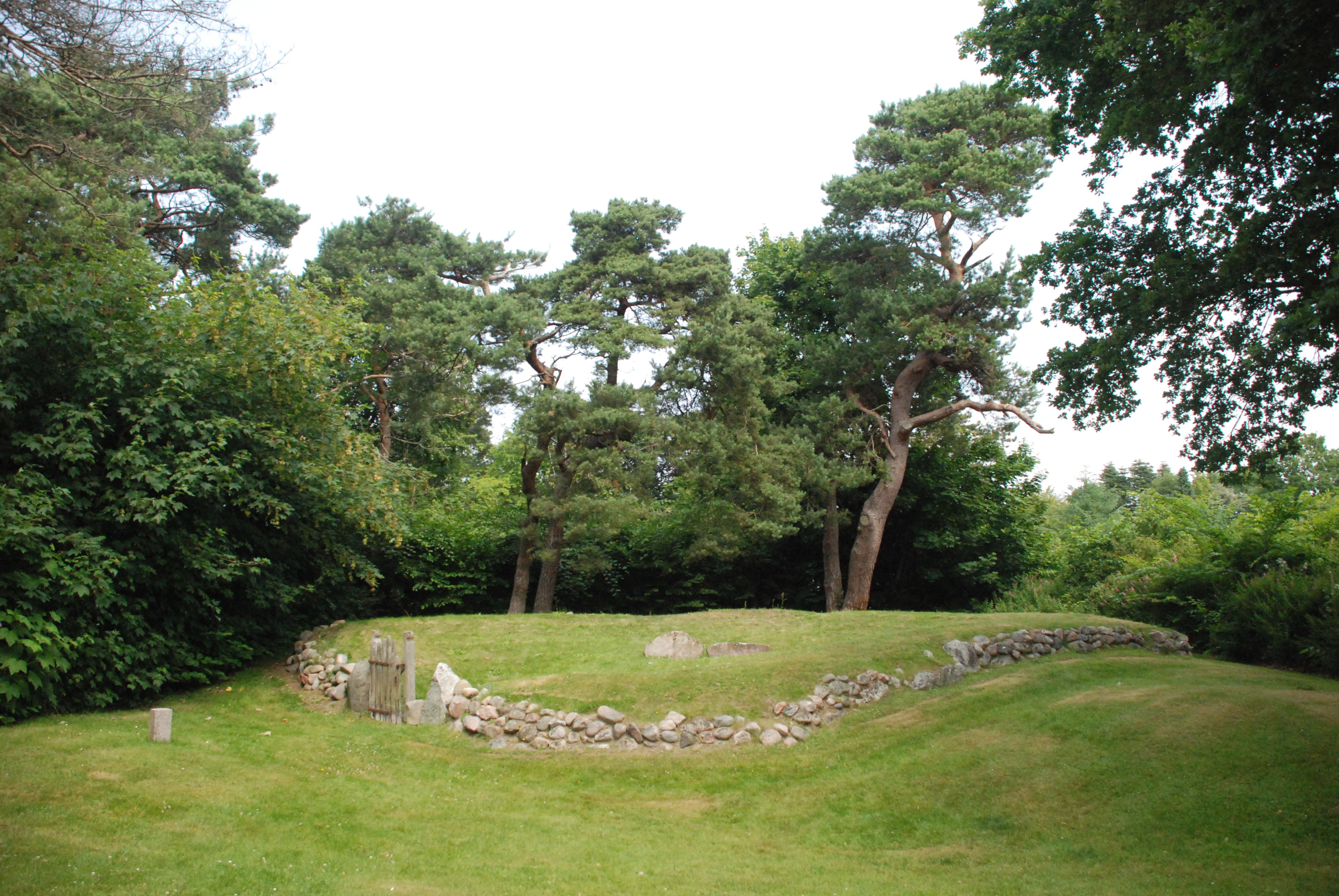 Helenes Grav, Tibirke Sogn, Holbo Herred, Frederiksborg Amt, Danmark, fotograferet fra syd.